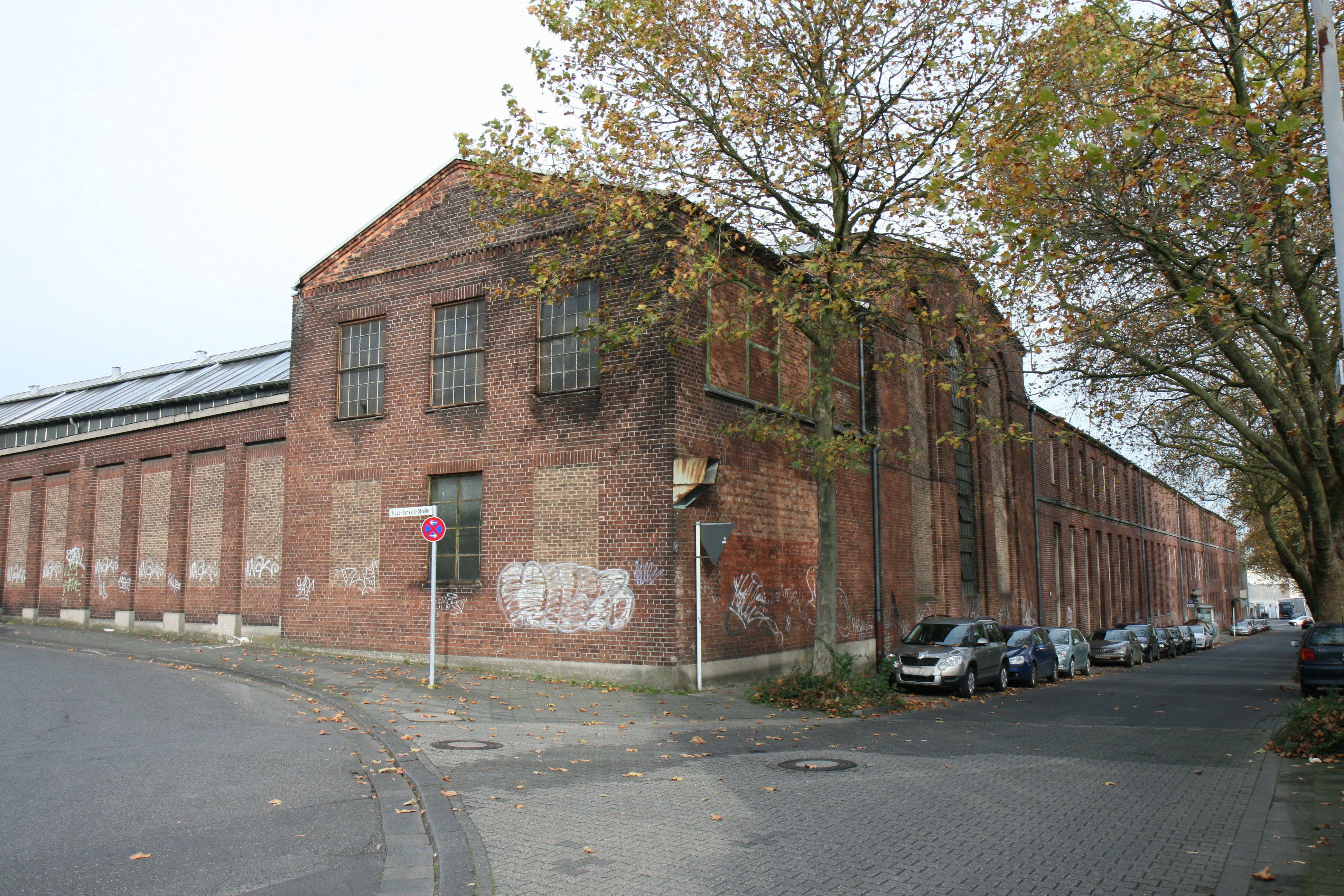 Werkshallen der ehemaligen Maschinenfabrik Froriep GmbH im Jahr 2014